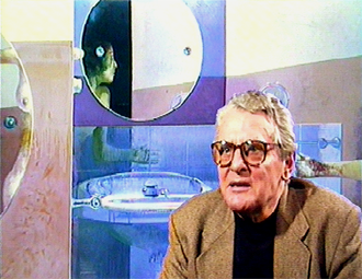 Portrait de Leonardo Cremonini